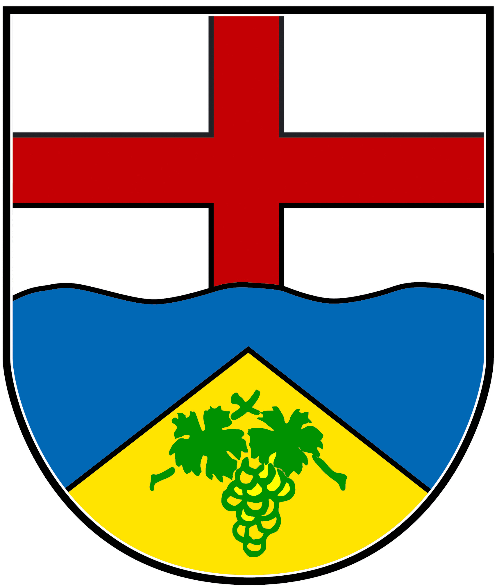 Wappen der Ortsgemeinde Ayl